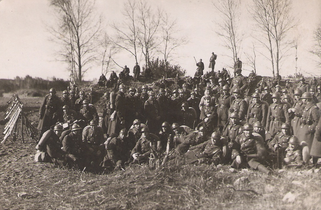 Ćwiczenia na Kugelbergu - maj 1929